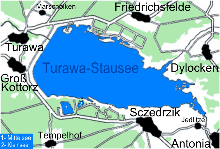 Karte Turawa-Stausee, Kr. Oppeln.